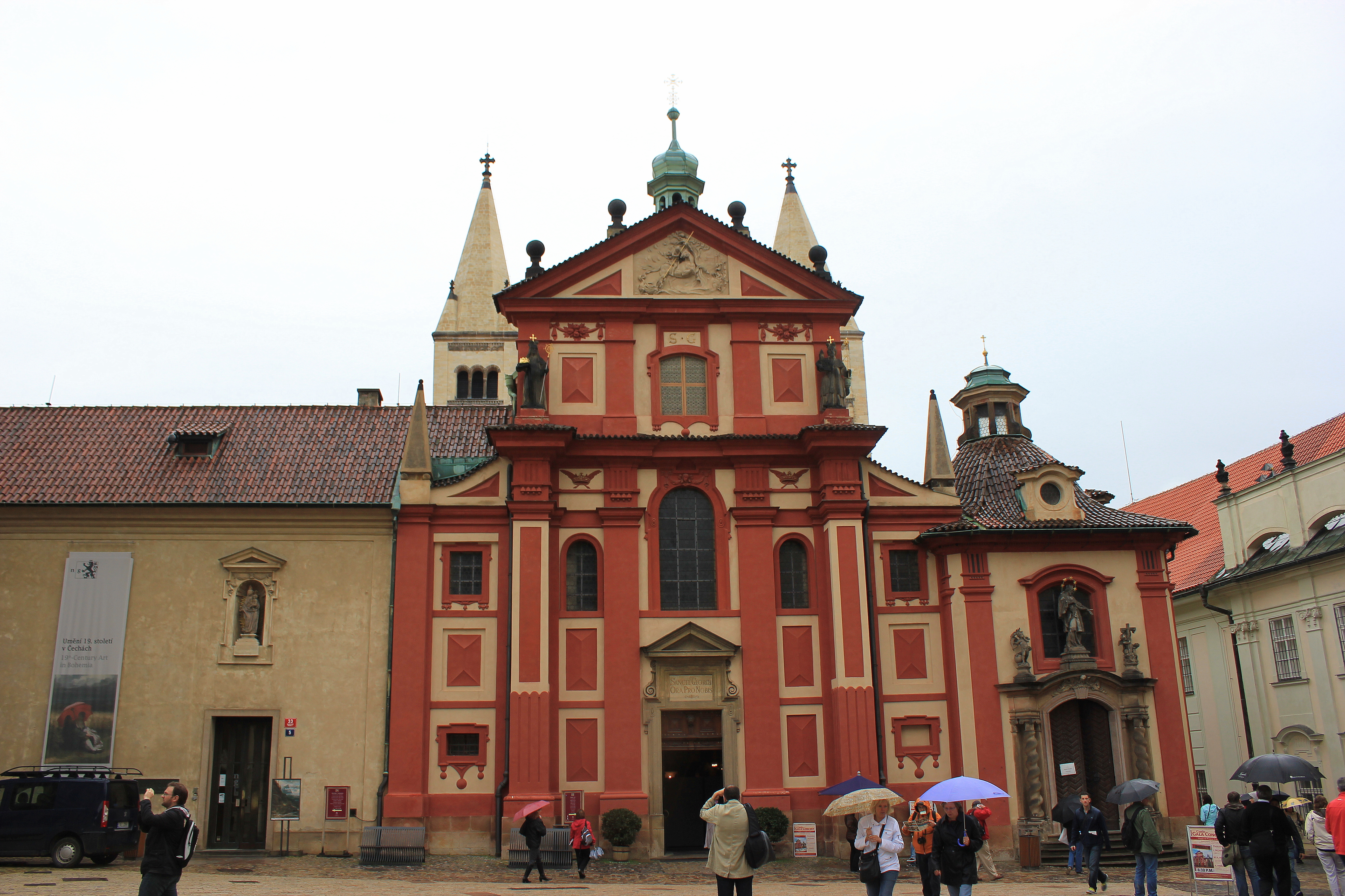 Basilica de San Jorge